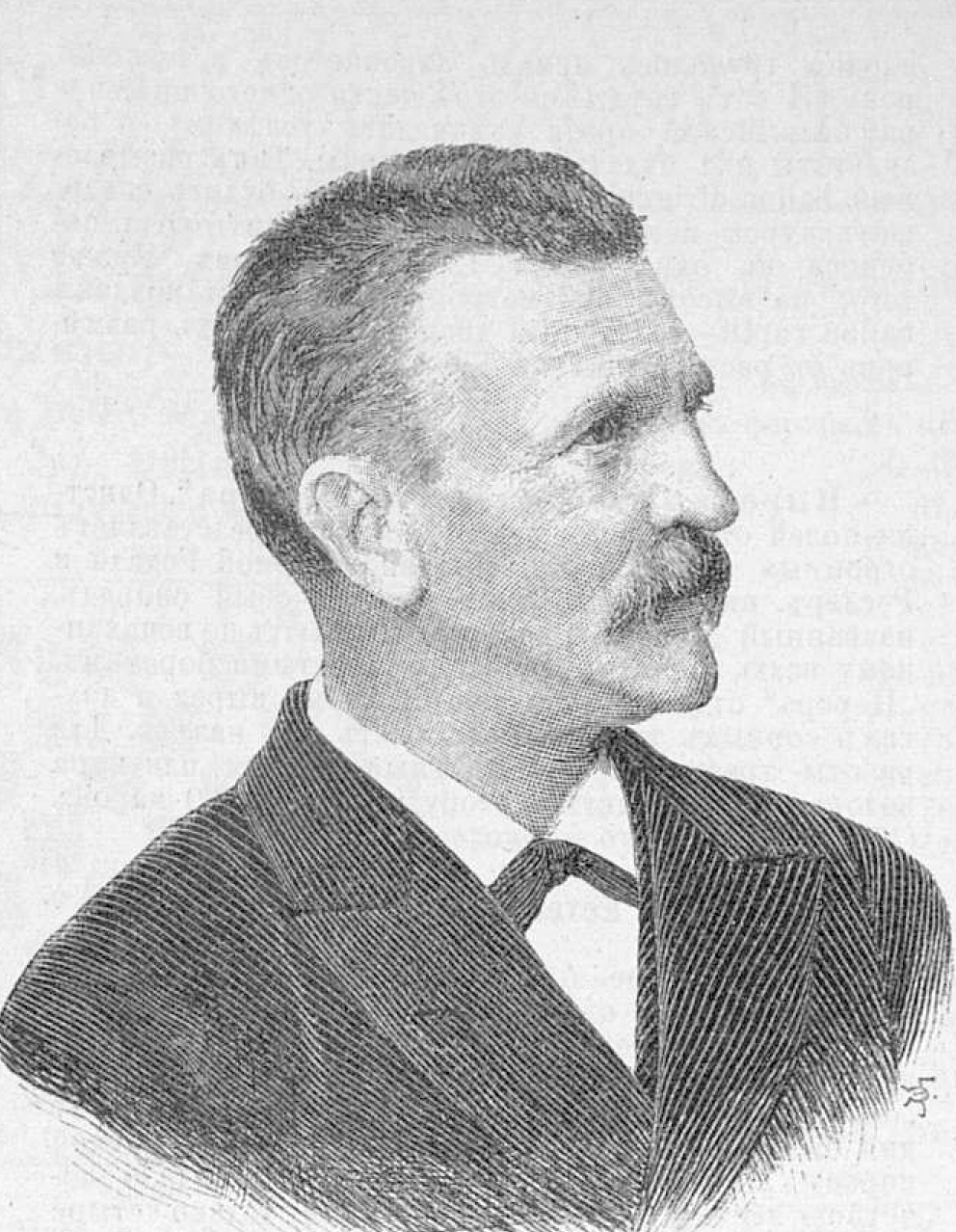 Шлёцер, Курд фон